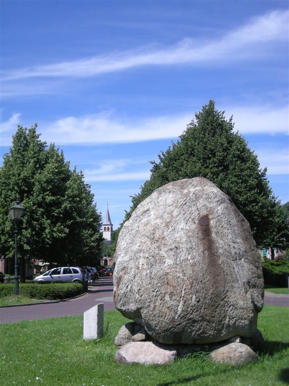 Steen bij Oudemirdum